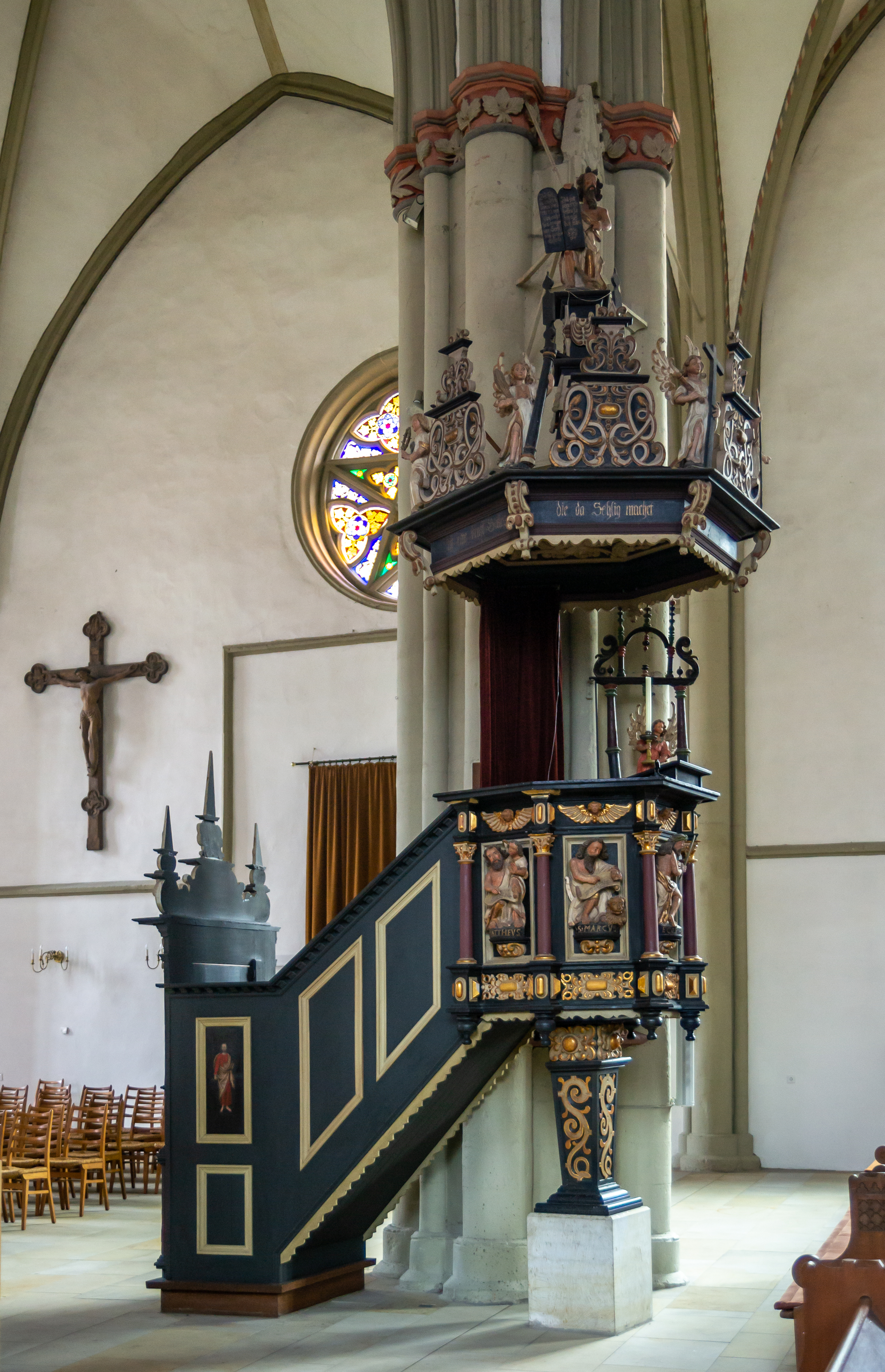 This image shows a heritage building in Germany, located in the North Rhine-Westphalian city Lemgo. Kanzel der evangelisch-lutherischen Kirche St. Marien in Lemgo